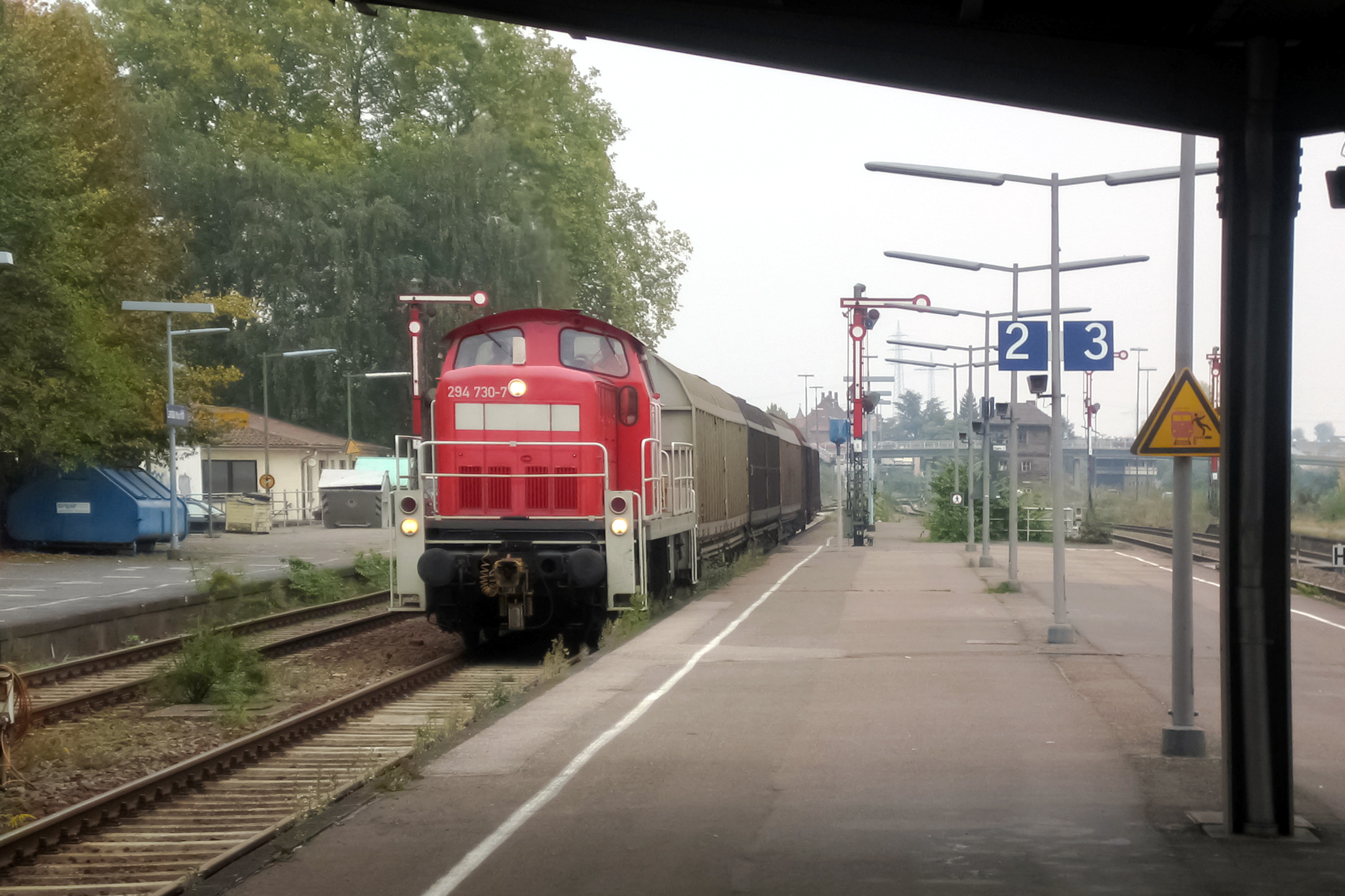 Güterzug beim Rangieren im Hbf. von Landau, selbst fotografiert